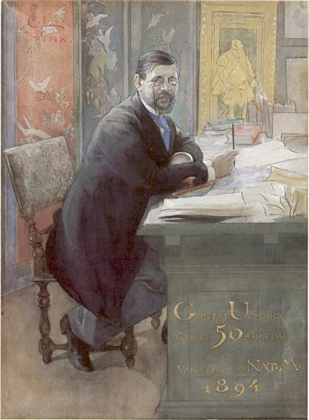 Gustaf Upmark (1844-1900). Portrait.